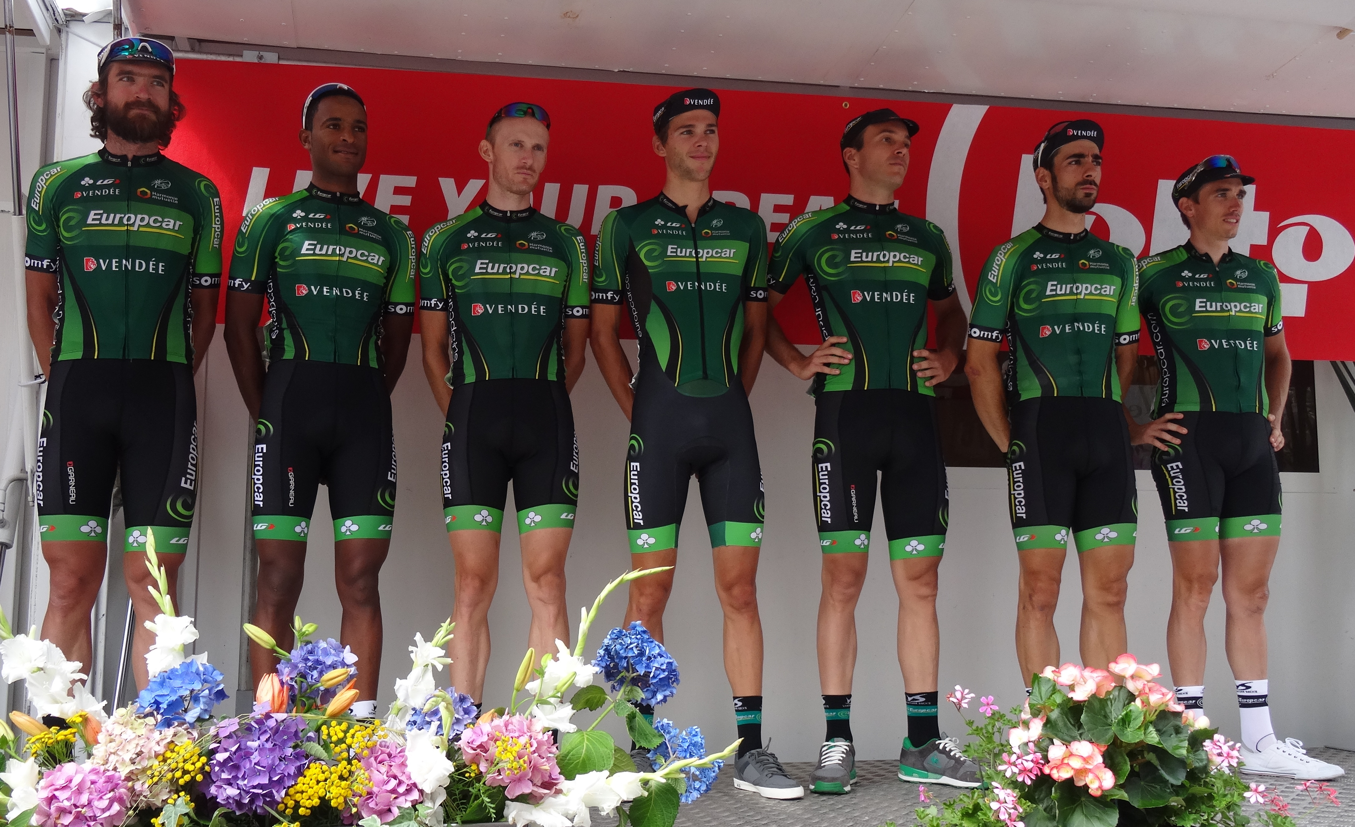 Reportage photographique réalisé le samedi 26 juillet à l'occasion du départ de la première étape du Tour de Wallonie 2014 à Frasnes-lez-Anvaing, Belgique.